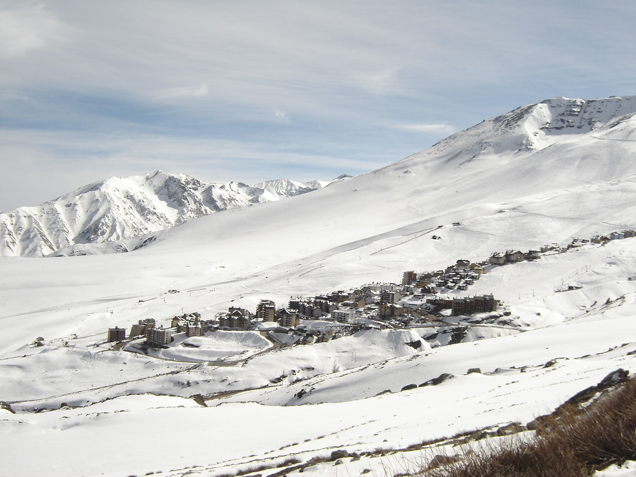 Vista del Centro de Ski La Parva, al oriente de Santiago de Chile